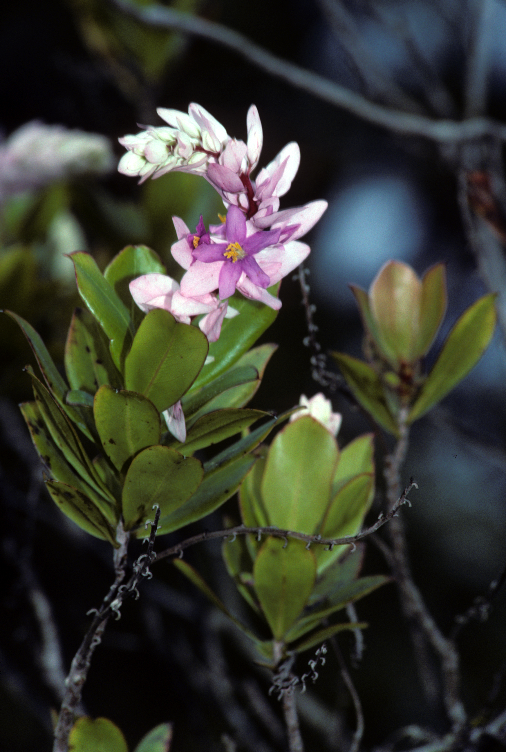 Purdiaea cubensis var. cubensis Jardin Botanico Nacional, Cuba. Mar. 1995. from slide.